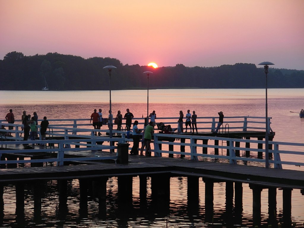 Zachód Słońca nad jeziorem Narie - pomost w Kretowinach